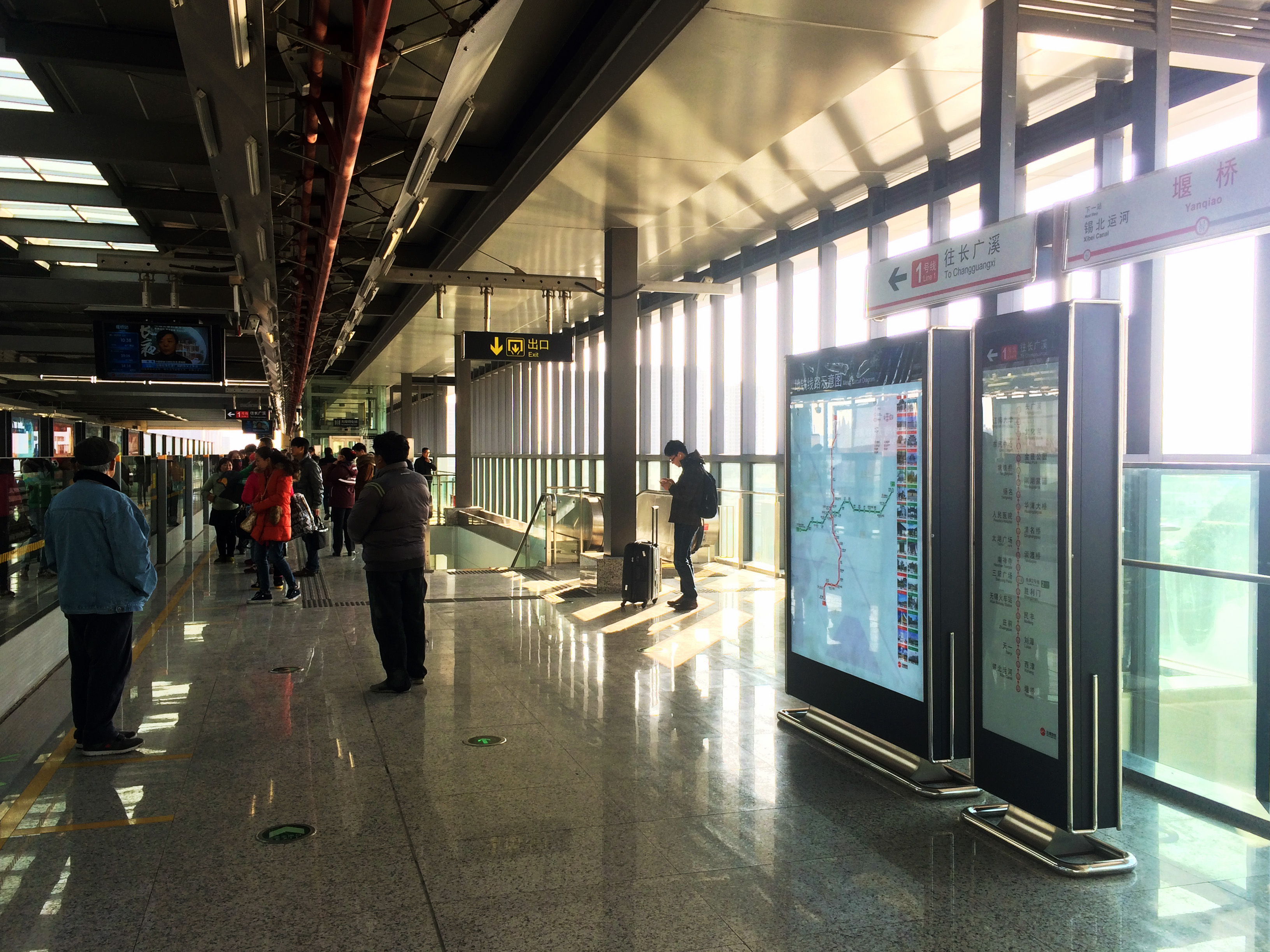 无锡地铁堰桥站站台